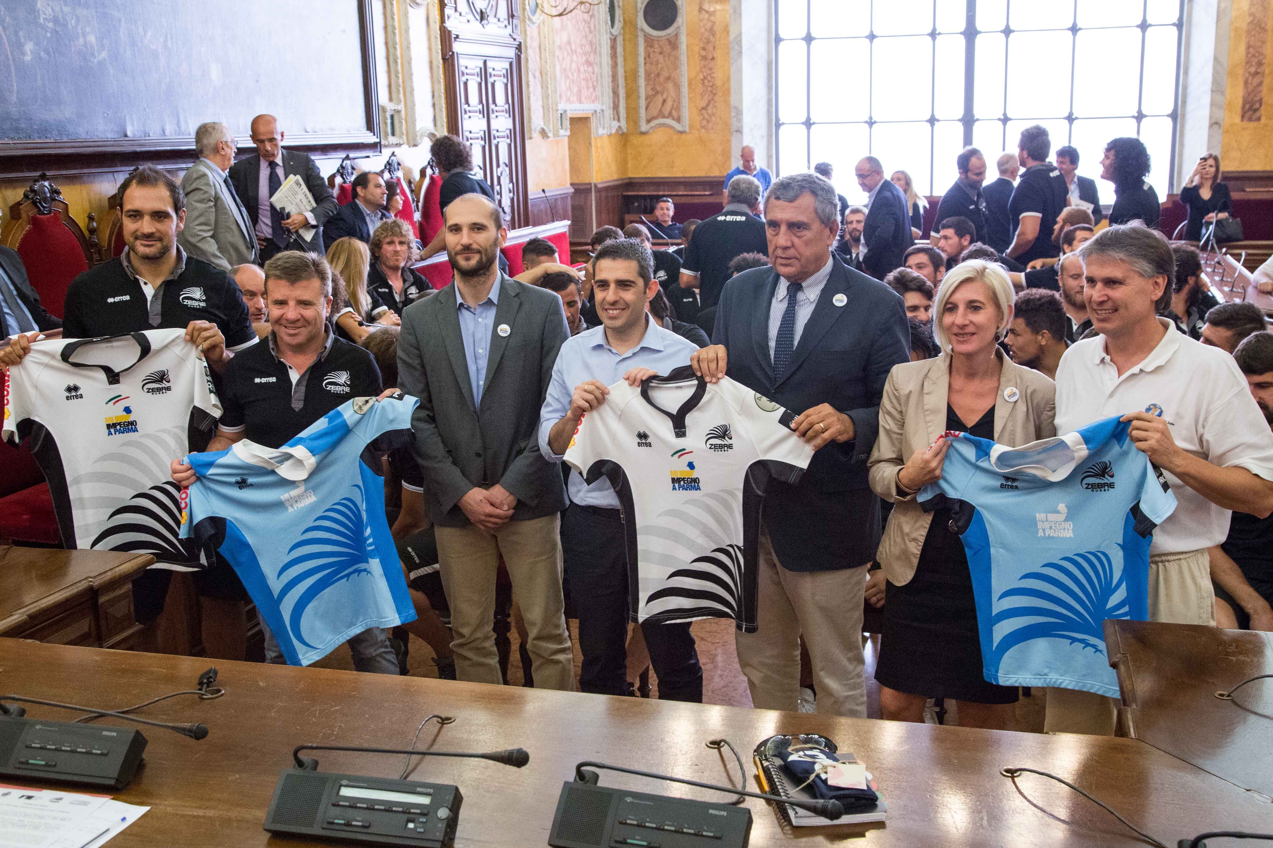 Presentazione della stagione 2014/2015 delle Zebre Rugby nella sala del Consiglio del Comune di Parma.